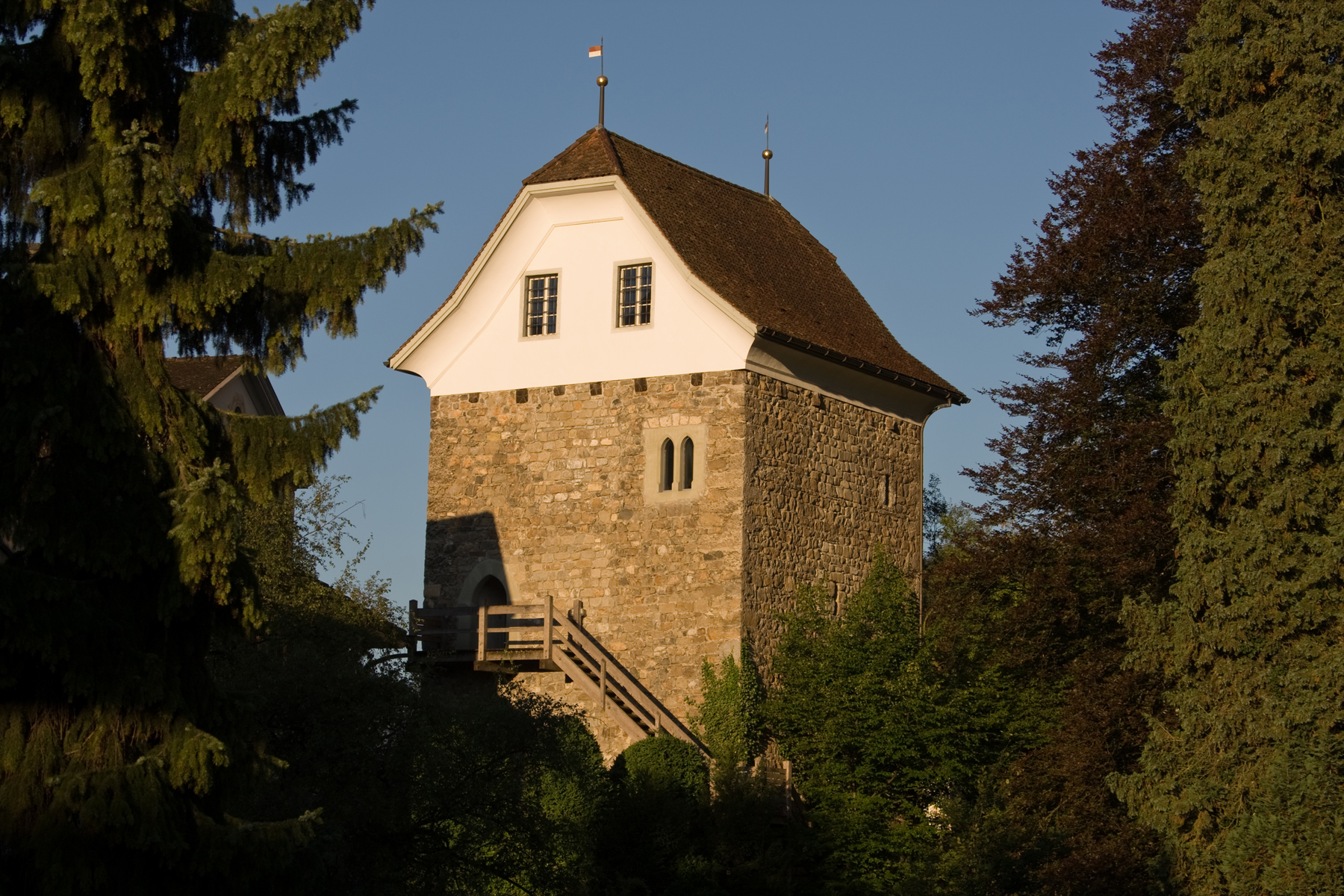 Hexen- oder Archivturm in Sarnen, Kanton Obwalden